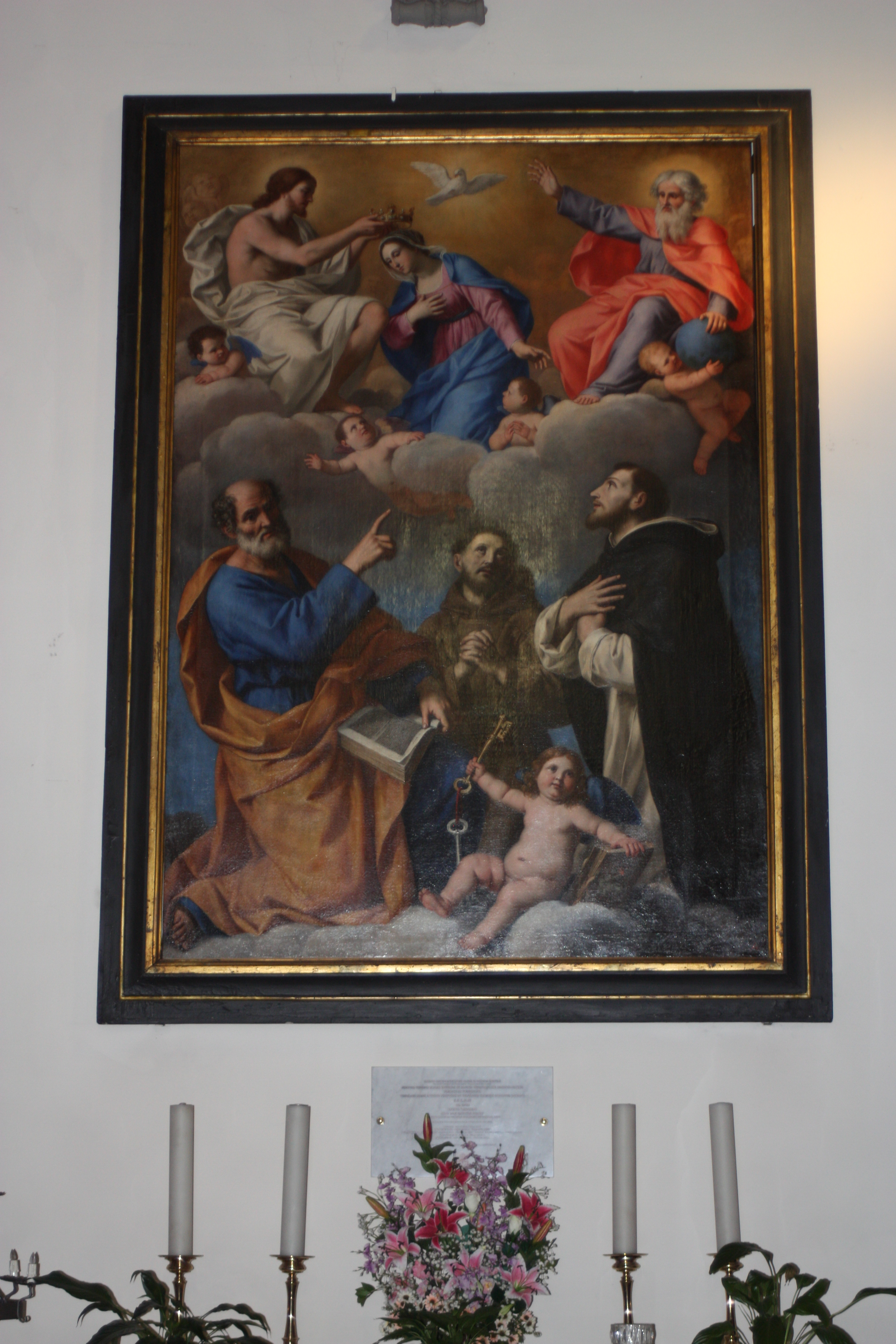 Immagine dell'Incoronazione della Vergine della Chiesa di San Quirico a Legnaia, dipinto seicentesco; sono presenti Maria, Dio Padre, Dio Figlio, Dio Spirito Santo; in basso: San Pietro, San Francesco, San Domenico